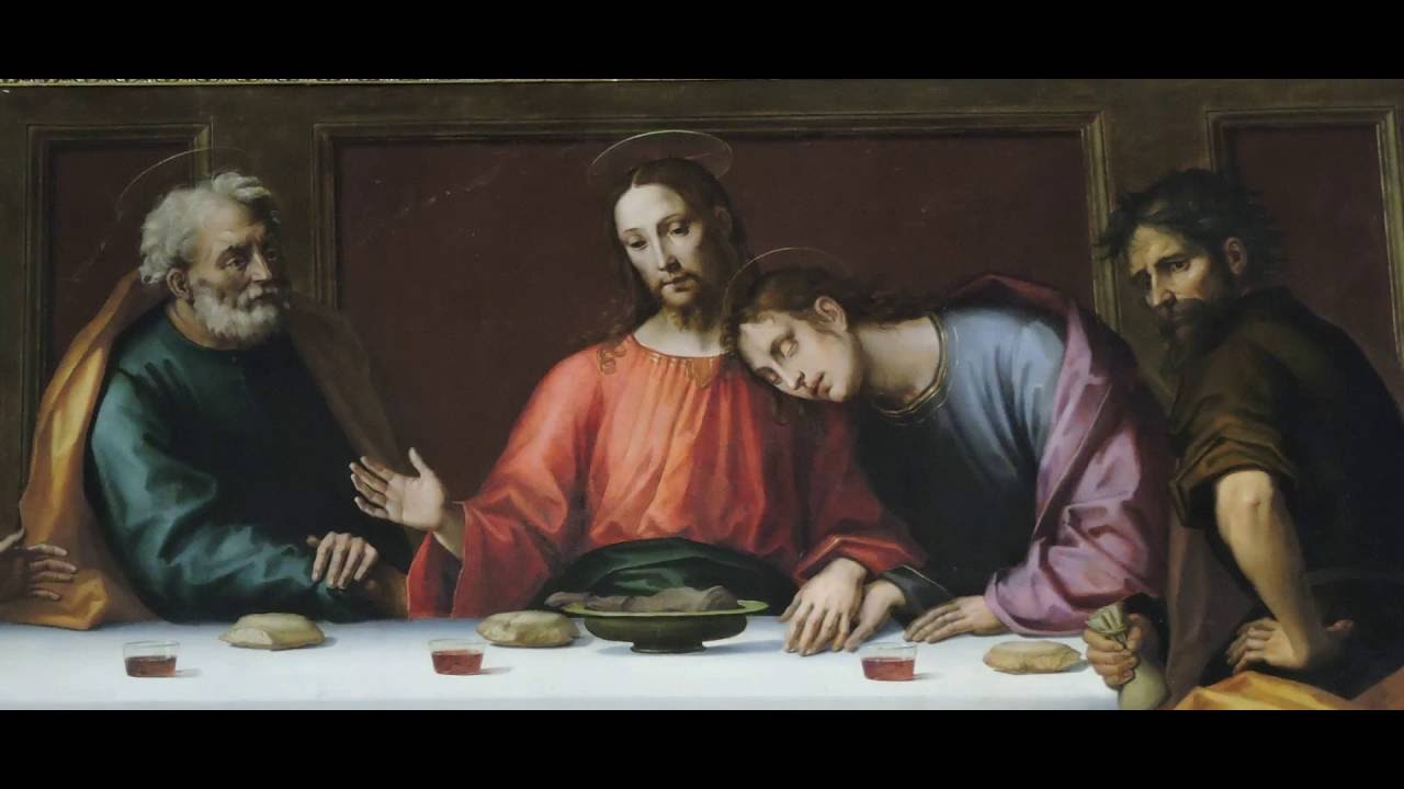 Particolare dell'Ultima Cena conservata presso la Propositura di Anghiari (AR)